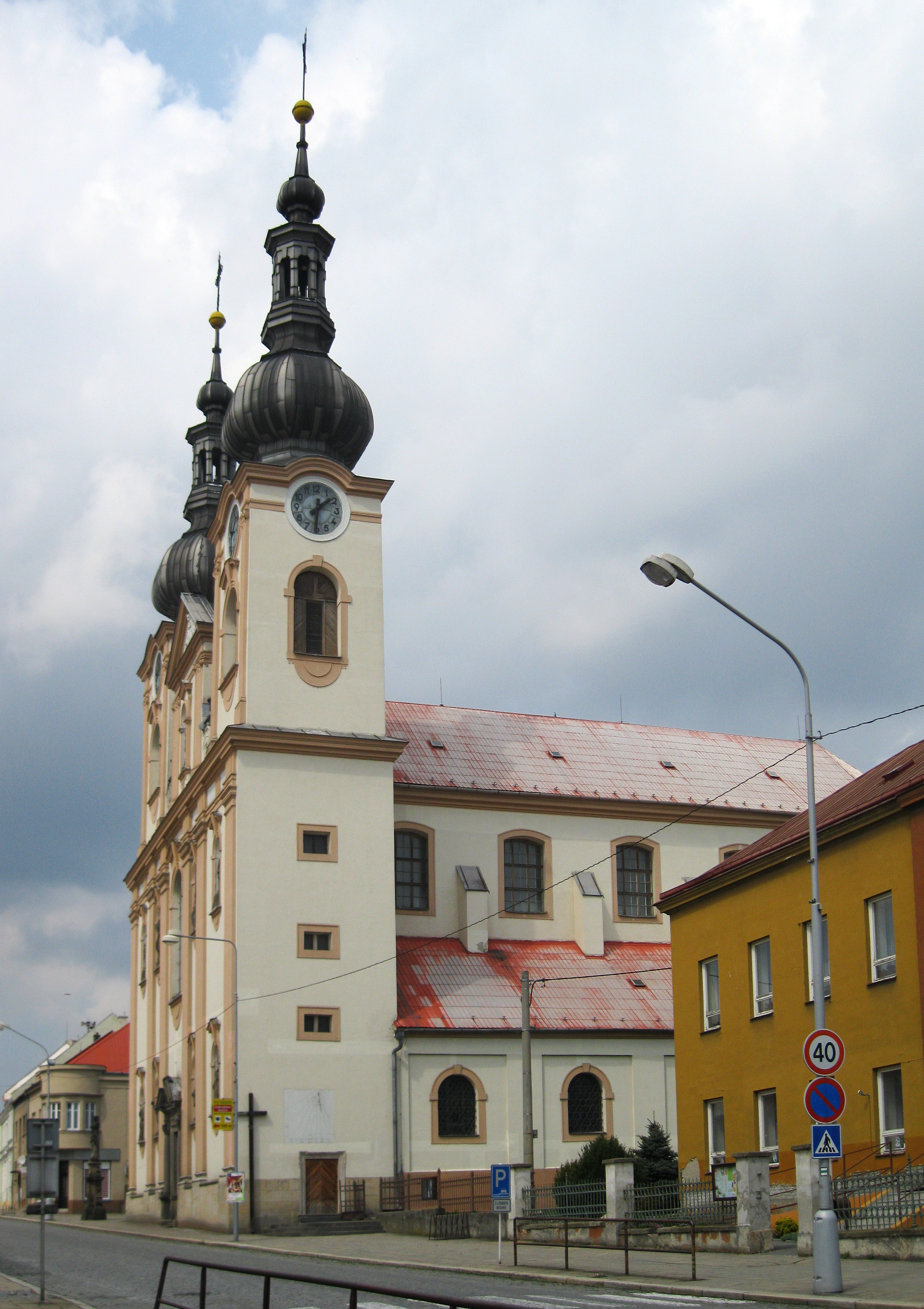 Kostel Nanebevzetí P. Marie (Kojetín)